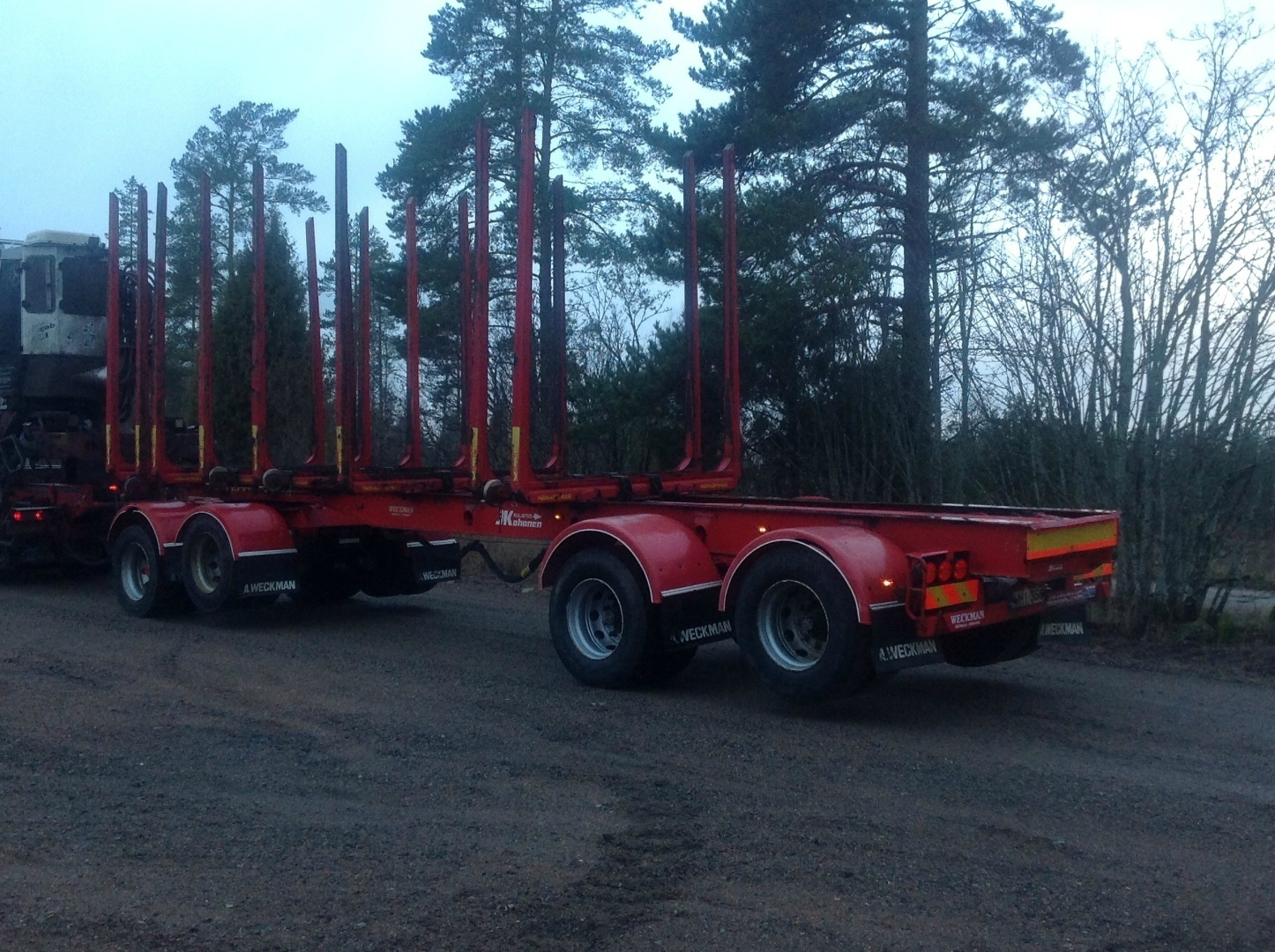 Kuvassa Weckman merkkinen perävaunu siirtotelillä